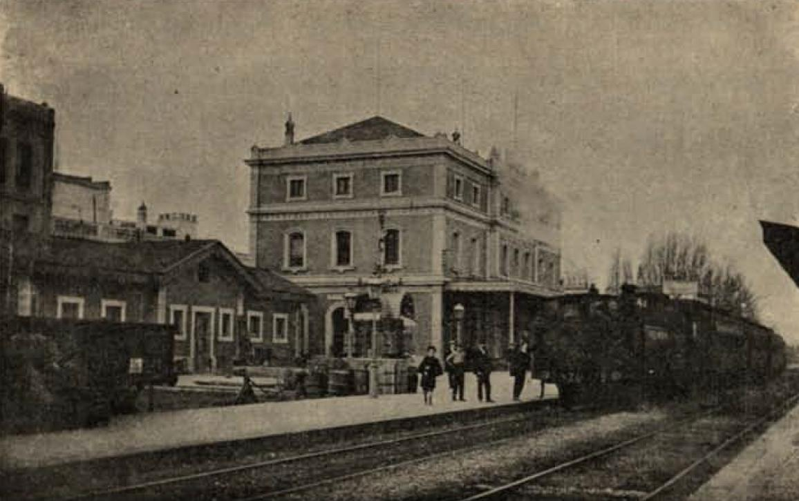 Estació Vella (Badalona)